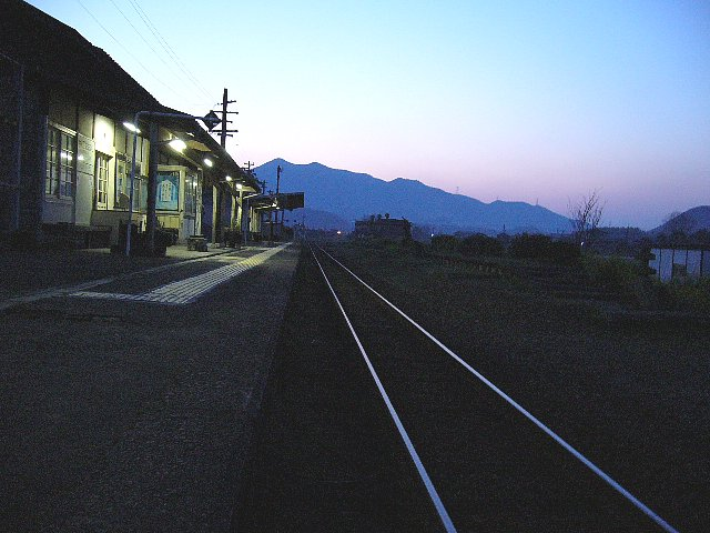 久大本線筑後大石駅 早朝の構内 東望 2006年3月 Bakkai撮影